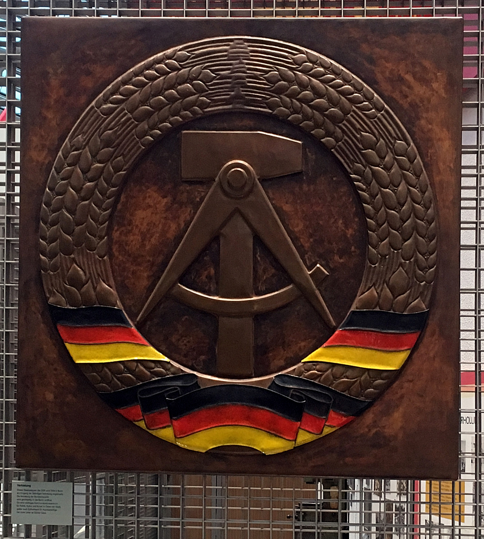 Bonn, Haus der Geschichte (Museumsmeile, Willy-Brandt-Allee 14, 53113 Bonn), Exponat der Dauerausstellung: Staatswappen der DDR; ursprünglich befestigt an der Fassade der vormaligen Ständigen Vertretung der Deutschen Demokratischen Republik bei der Bundesrepublik Deutschland. Das Gebäude steht an der Godesberger Allee 18 in Bonn.